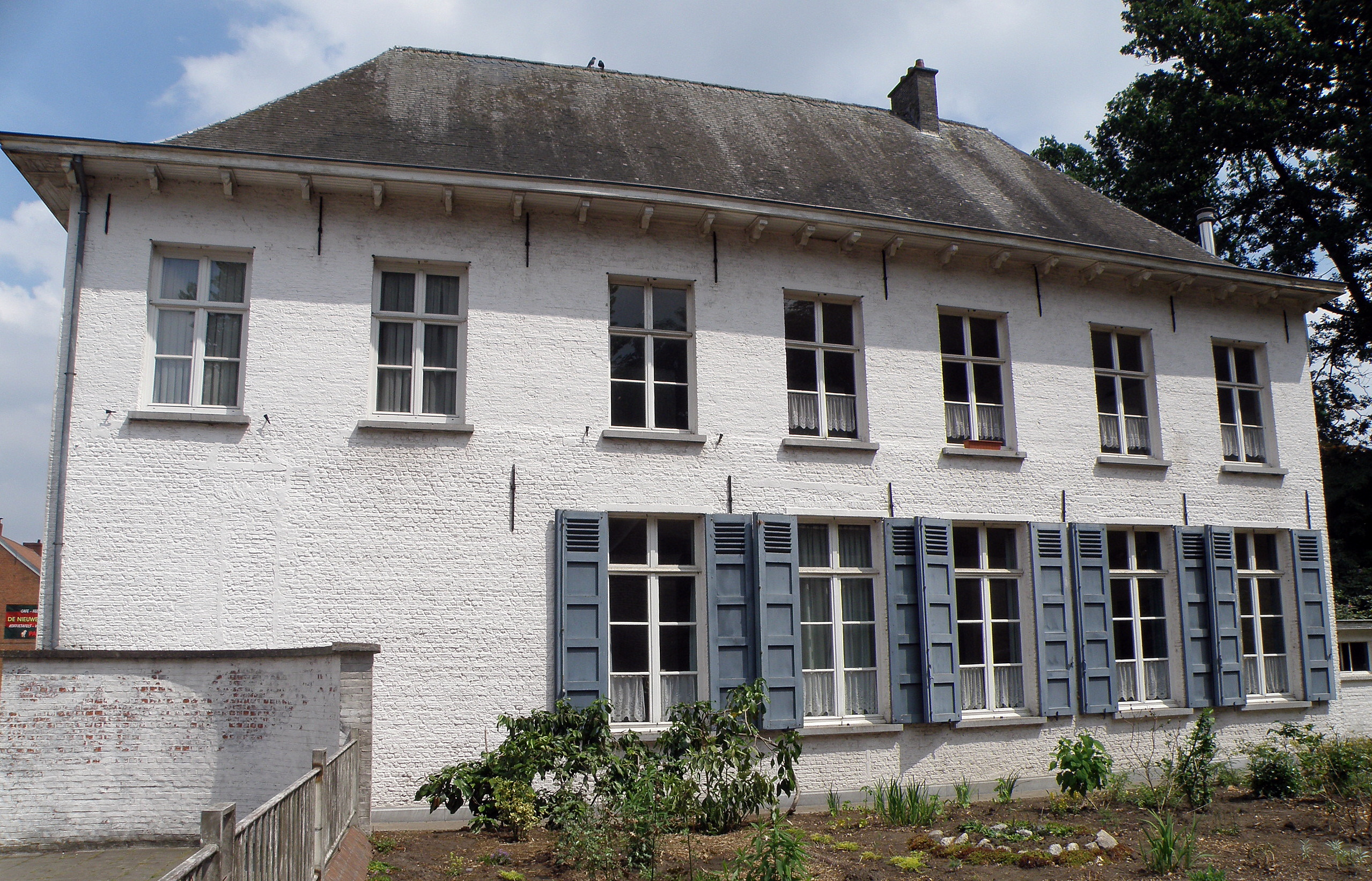 Antwerpen, district Wilrijk. Pastorie van de Sint-Bavokerk, gelegen aan de Sint-Bavostraat te Wilrijk. Opgetrokken omstr. 1640, verbouwd en vergroot (o.m. bijbouwen verdieping) in 1874.